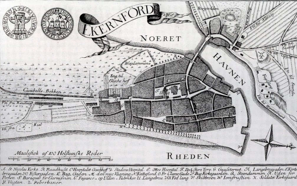 dänischsprachiger Stadtplan Eckernfördes von 1768; eigener Scan